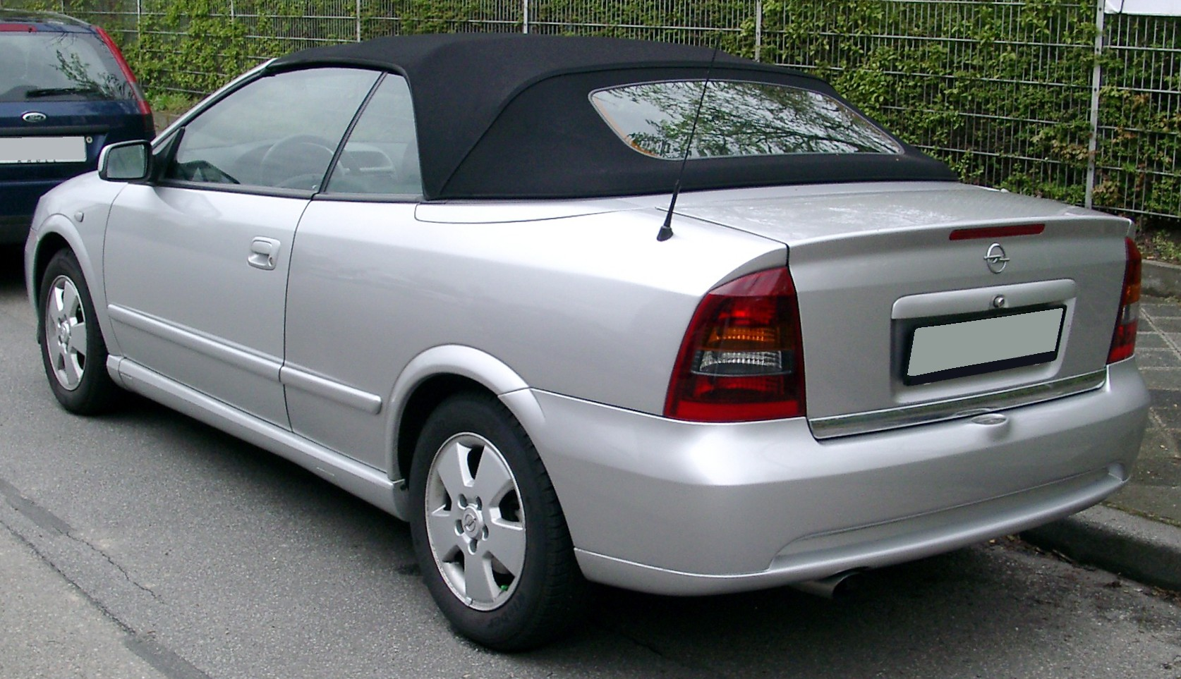 Opel Astra G Cabriolet